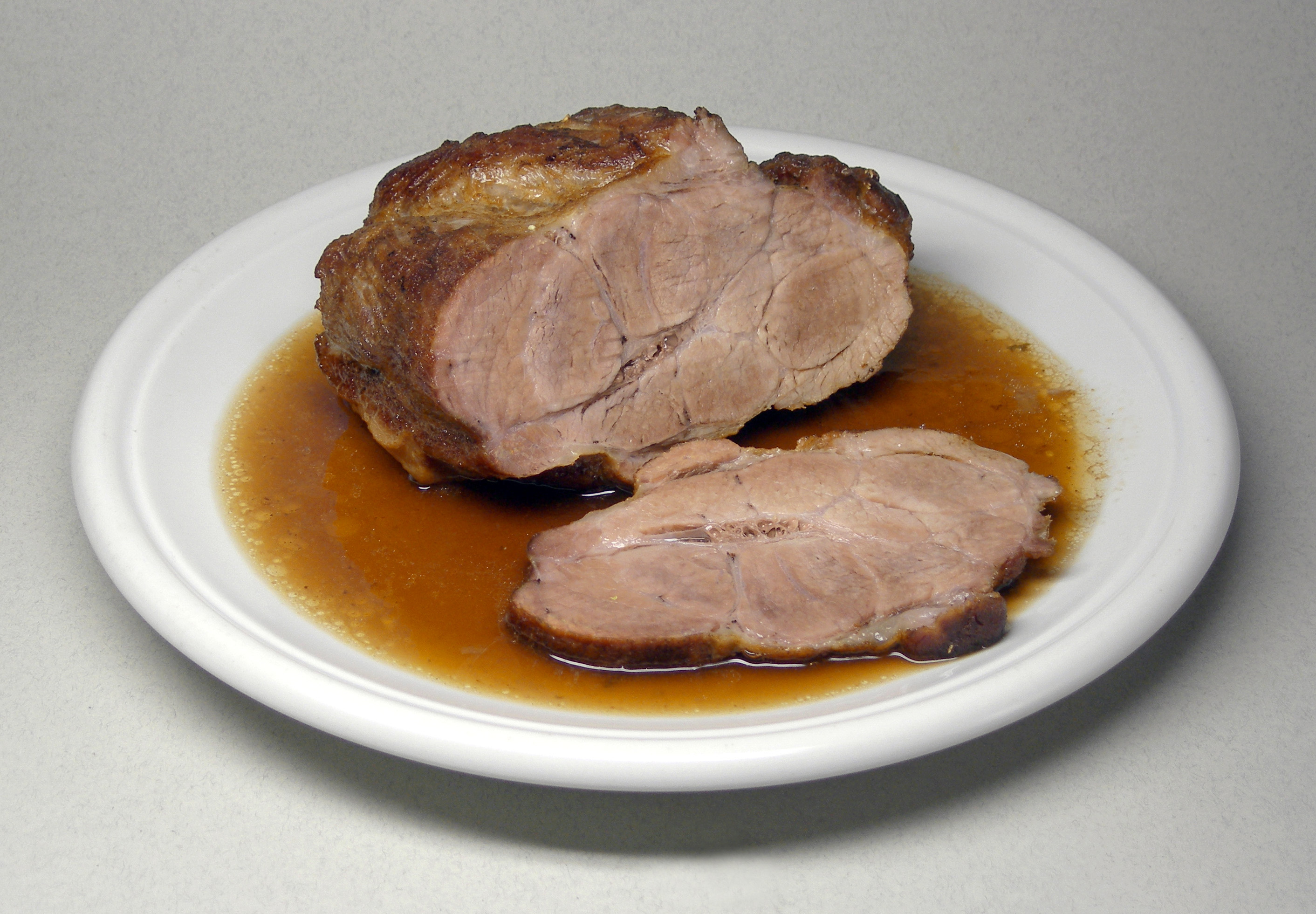 Roast pork, bavarian style